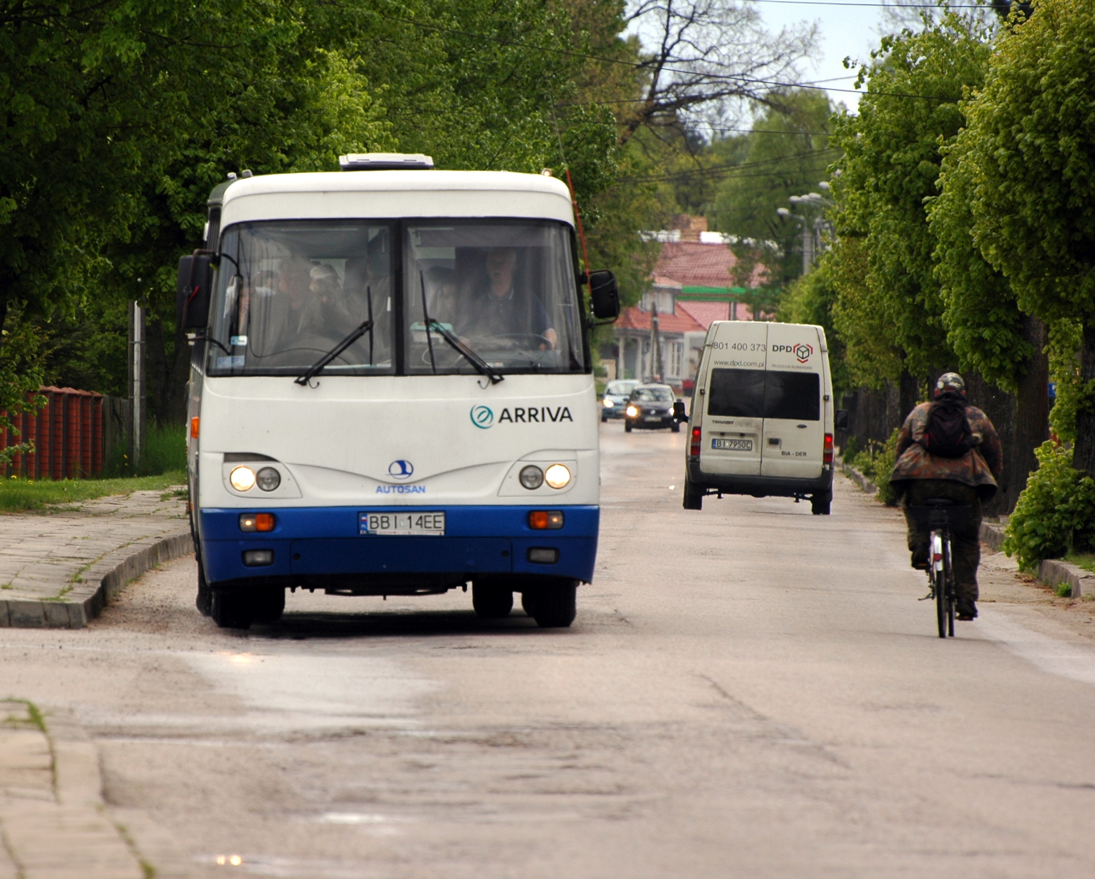 Autobus Autosan H9-21/A09 w Białowieży